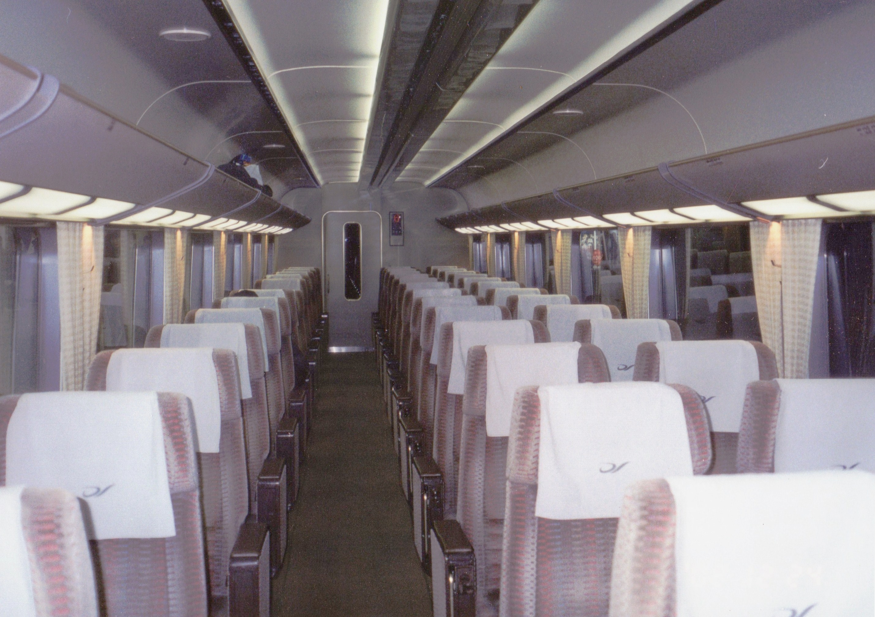 旧デラックスシート車